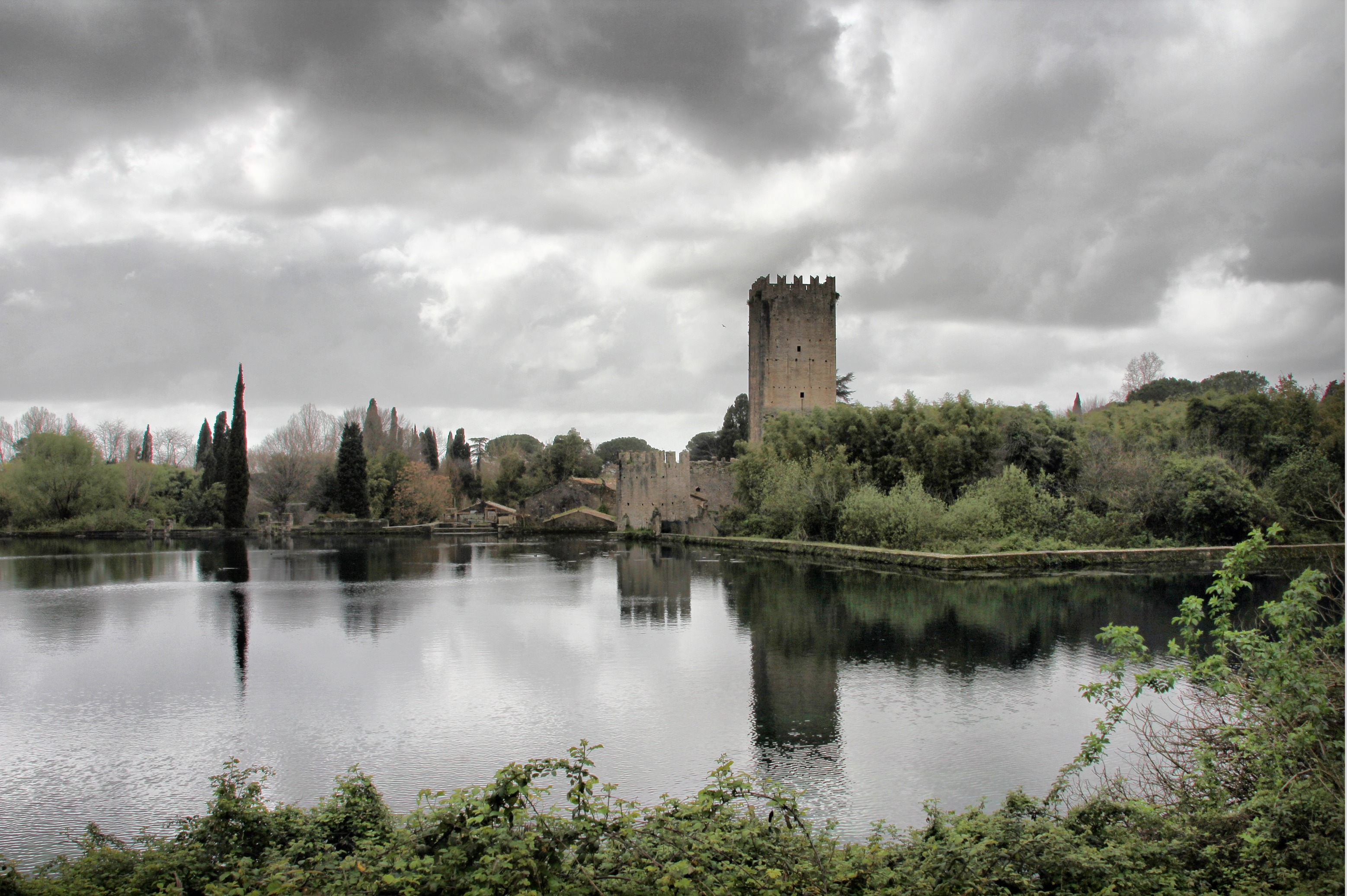 Giardino di Ninfa con i ruderi della città medievale This is a photo of a monument which is part of cultural heritage of Italy. This monument participates in the context Wiki Loves Monuments Italia 2013.